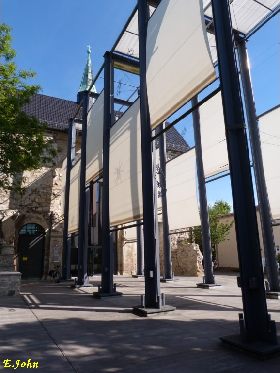 Nordhausen am Harz, Marienkirche auf dem Frauenberg, 2011